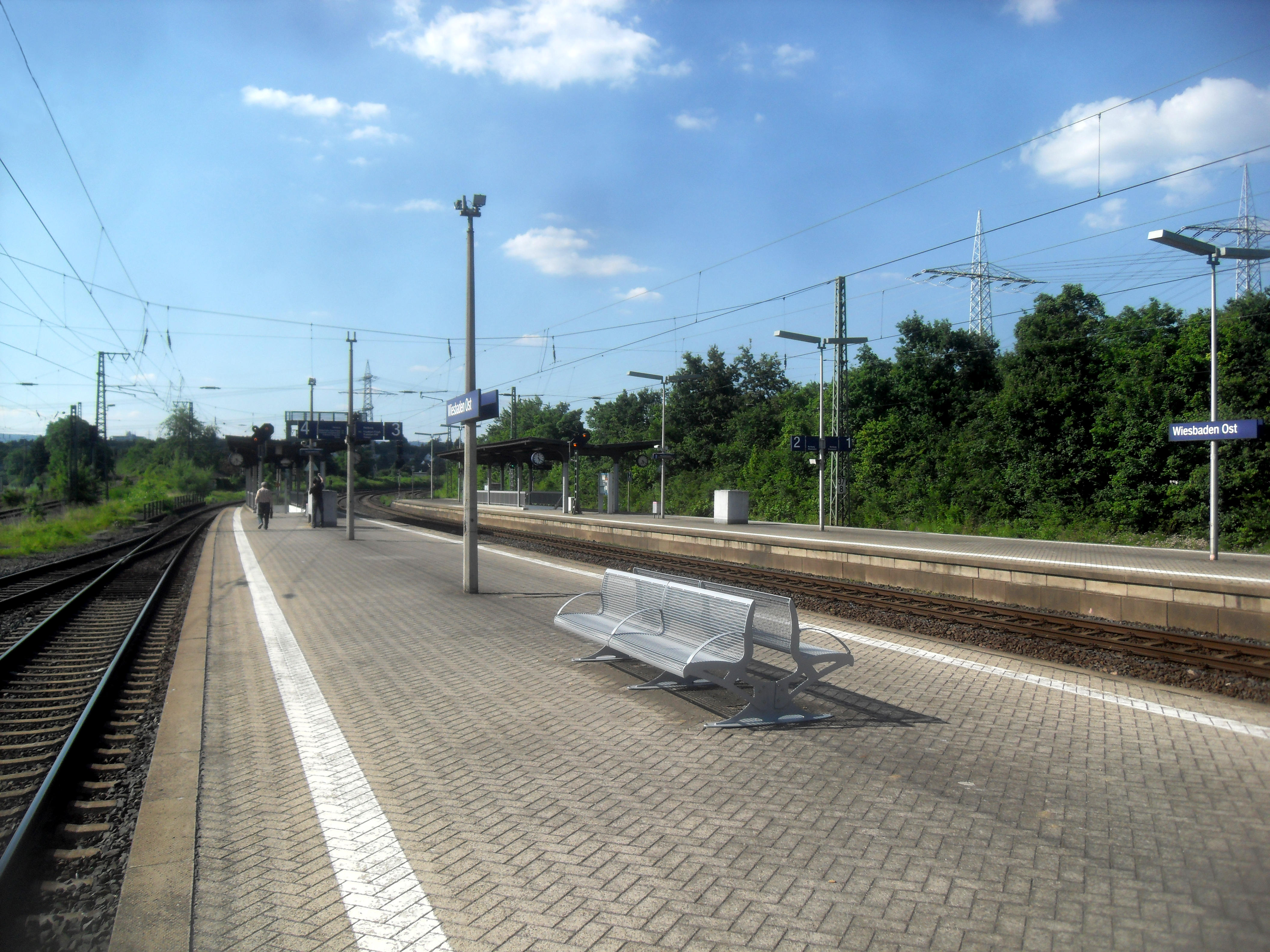 Die Bahnsteige zu den Gleisen 3 und 4 des Bahnhofs Wiesbaden-Ost in Hessen (Deutschland)